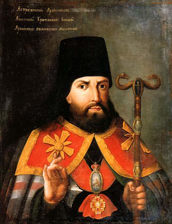 Анастасий (Братановский-Романенко), архиеп. Астраханский. Портрет. Неизв. художник. 1-я треть XIX в. (ГИМ)